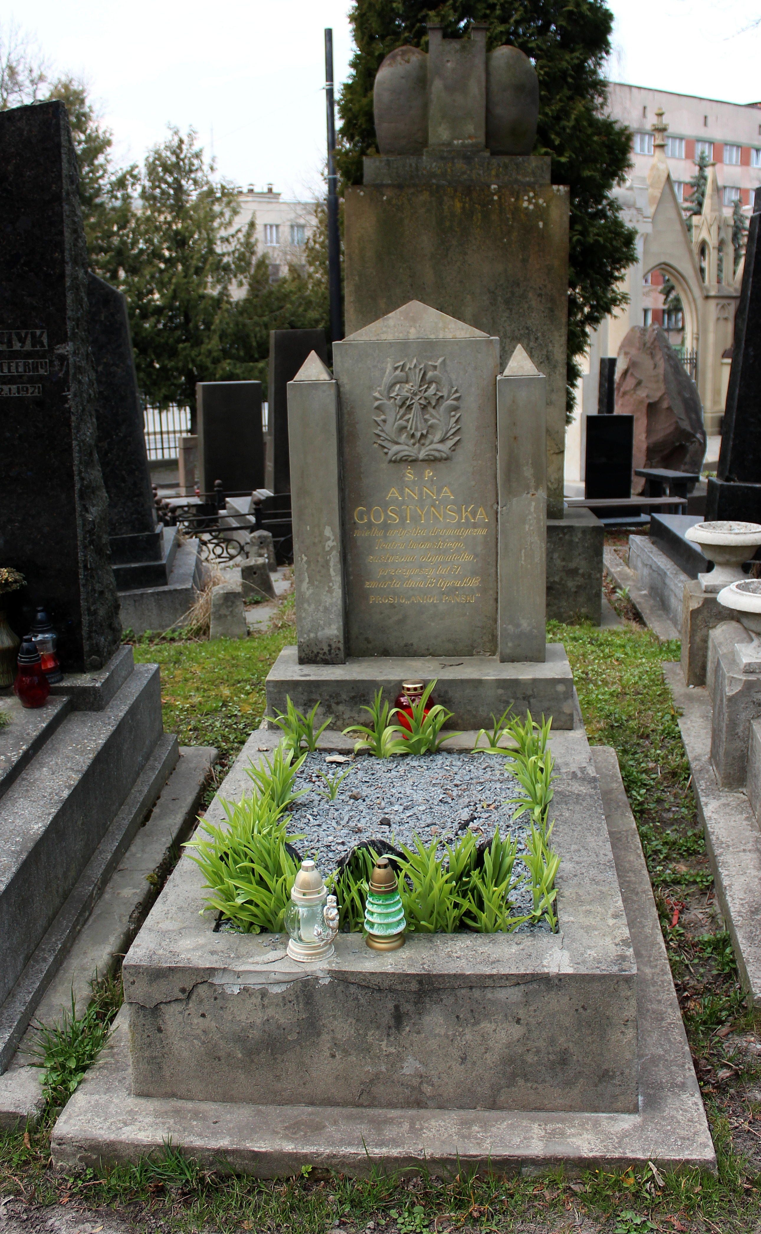 Пам'ятник на могилі А. Гостинської. Личаківський цвинтар , поле № 1.